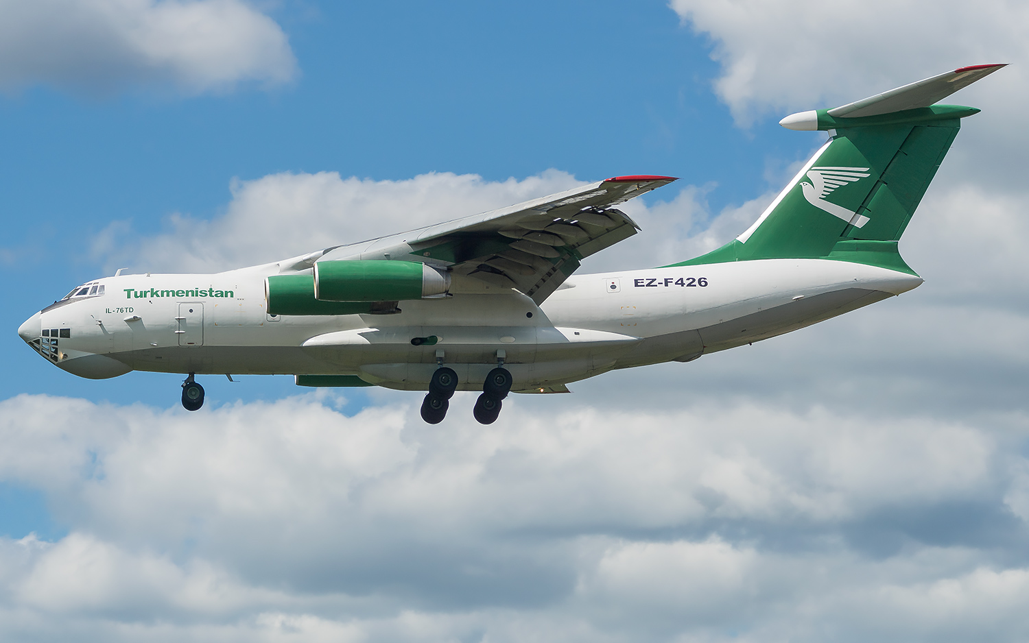 EZ-F426 IL76(TD) Turkmenistan UUMB